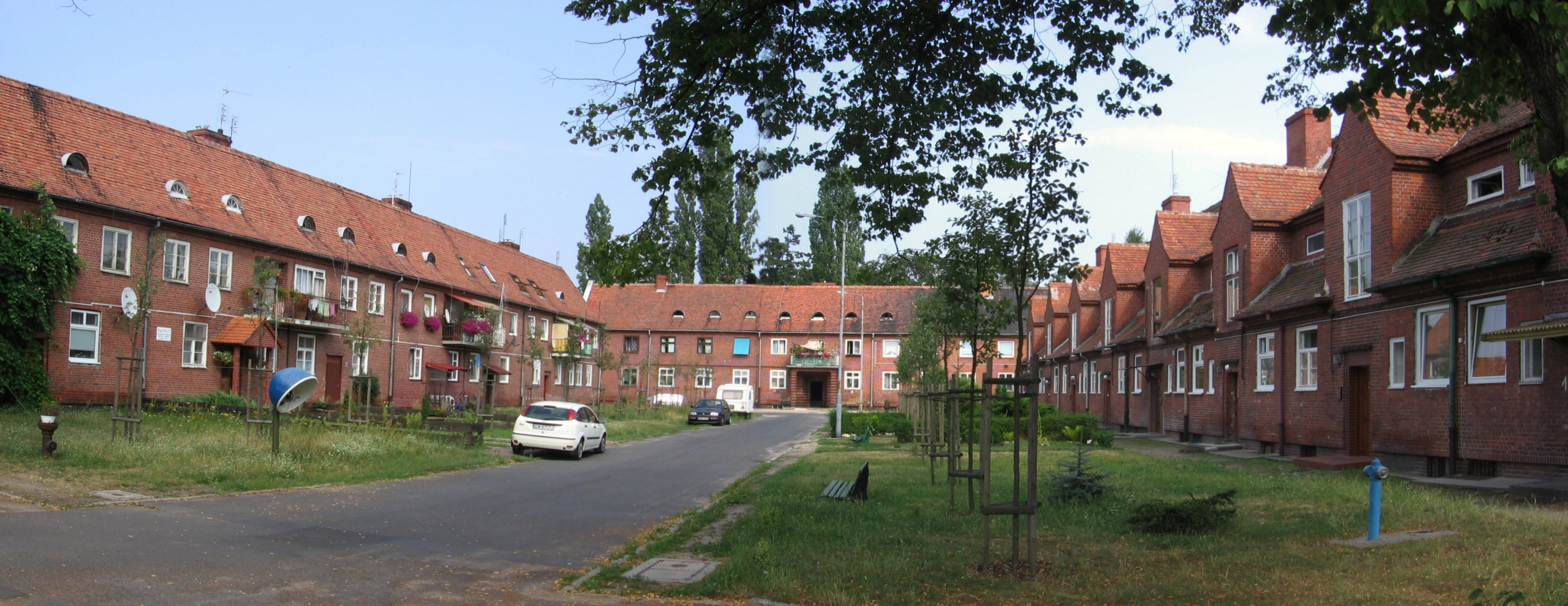 Piwowarska street, old buildings in settlement Pracze Odrzańskie, Wrocław, Poland